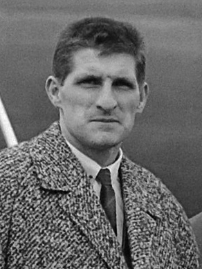 Aankomst Nederlands elftal op Schiphol, v.l.n.r. Graafland, Korver, Moulijn, Haak, Neville, Nuninga en Fransen 28 januari 1965